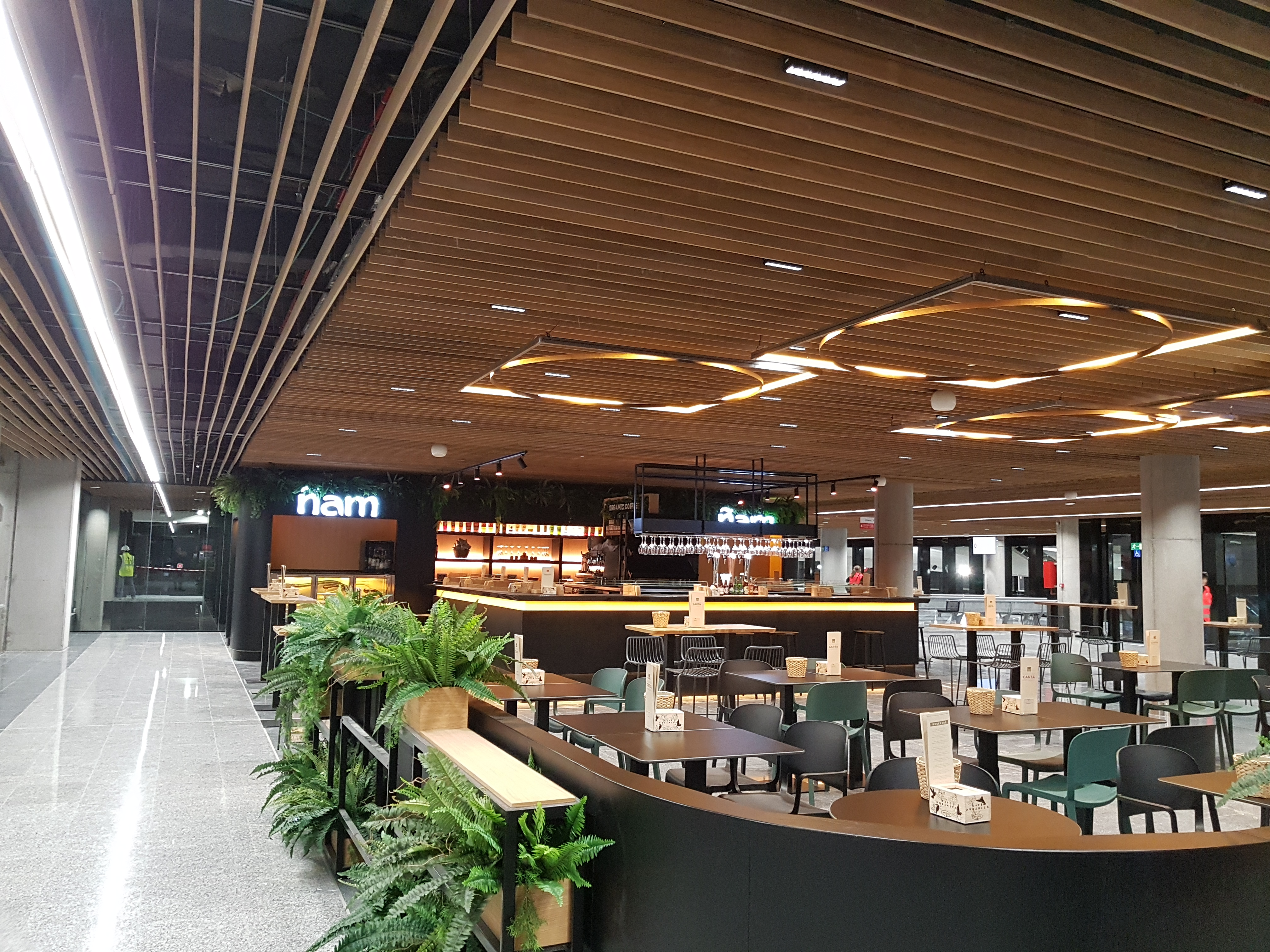 Bilbao Intermodal.